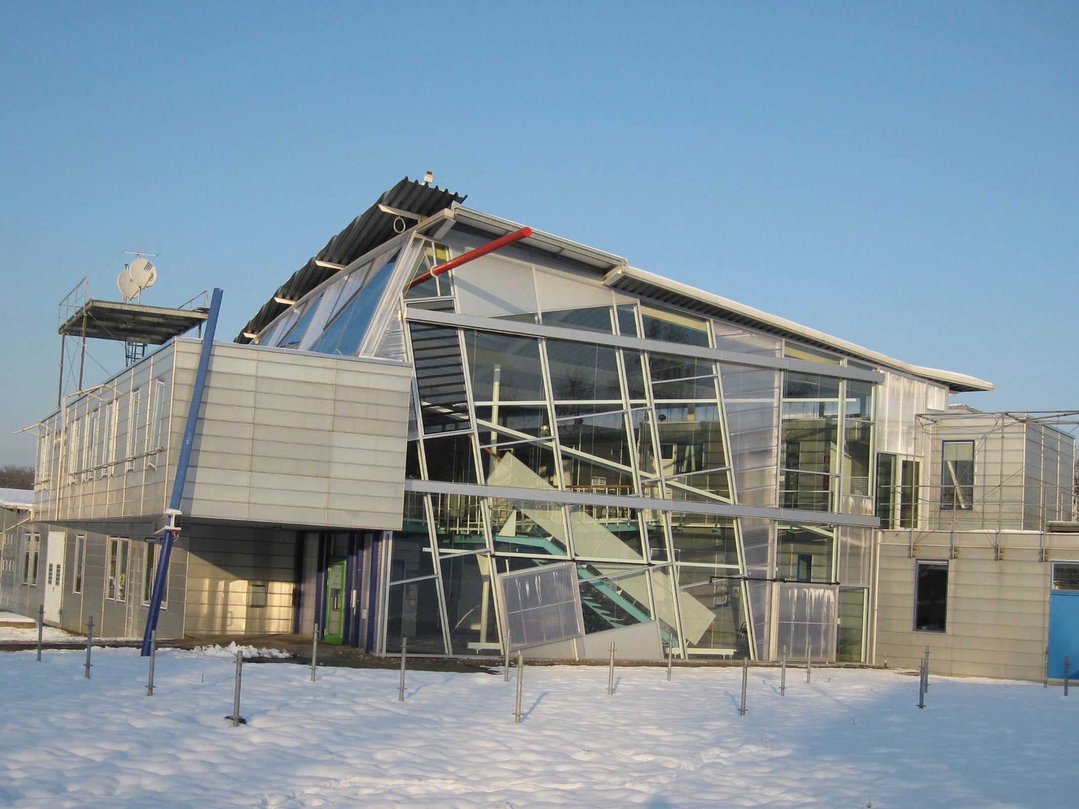 HYSOLAR-Haus, 1987-89, heute: „Visus Institut“ (Visualisierungsinstitut) der Universität Stuttgart. Konzeption + Realisierung: Behnisch & Partner - (vormals Günter Behnisch)